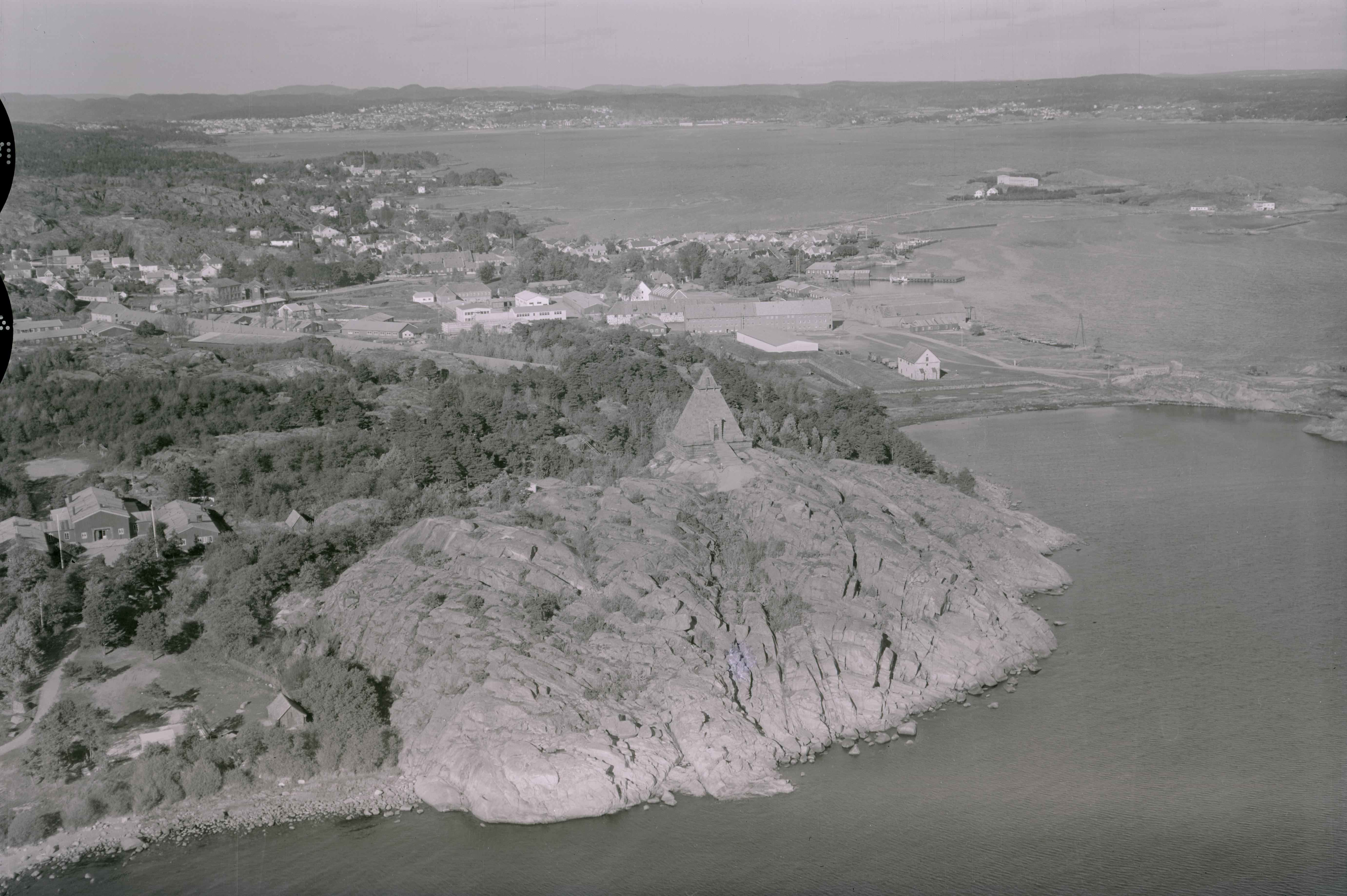 WF.HL.65803 Minnehallen mot Larvik